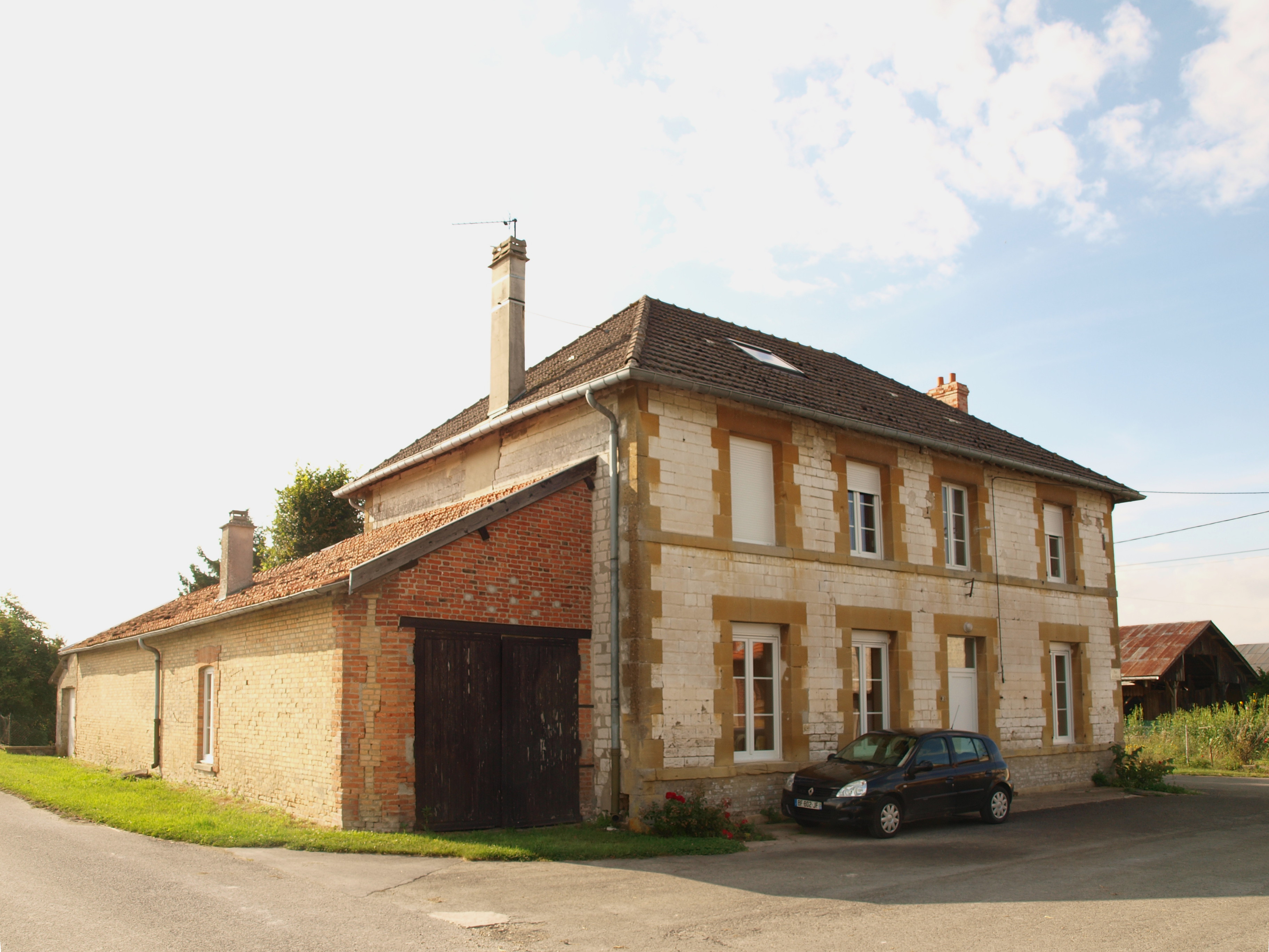 Saint-Clément-à-Arnes (Ardennes, France) ; mairie